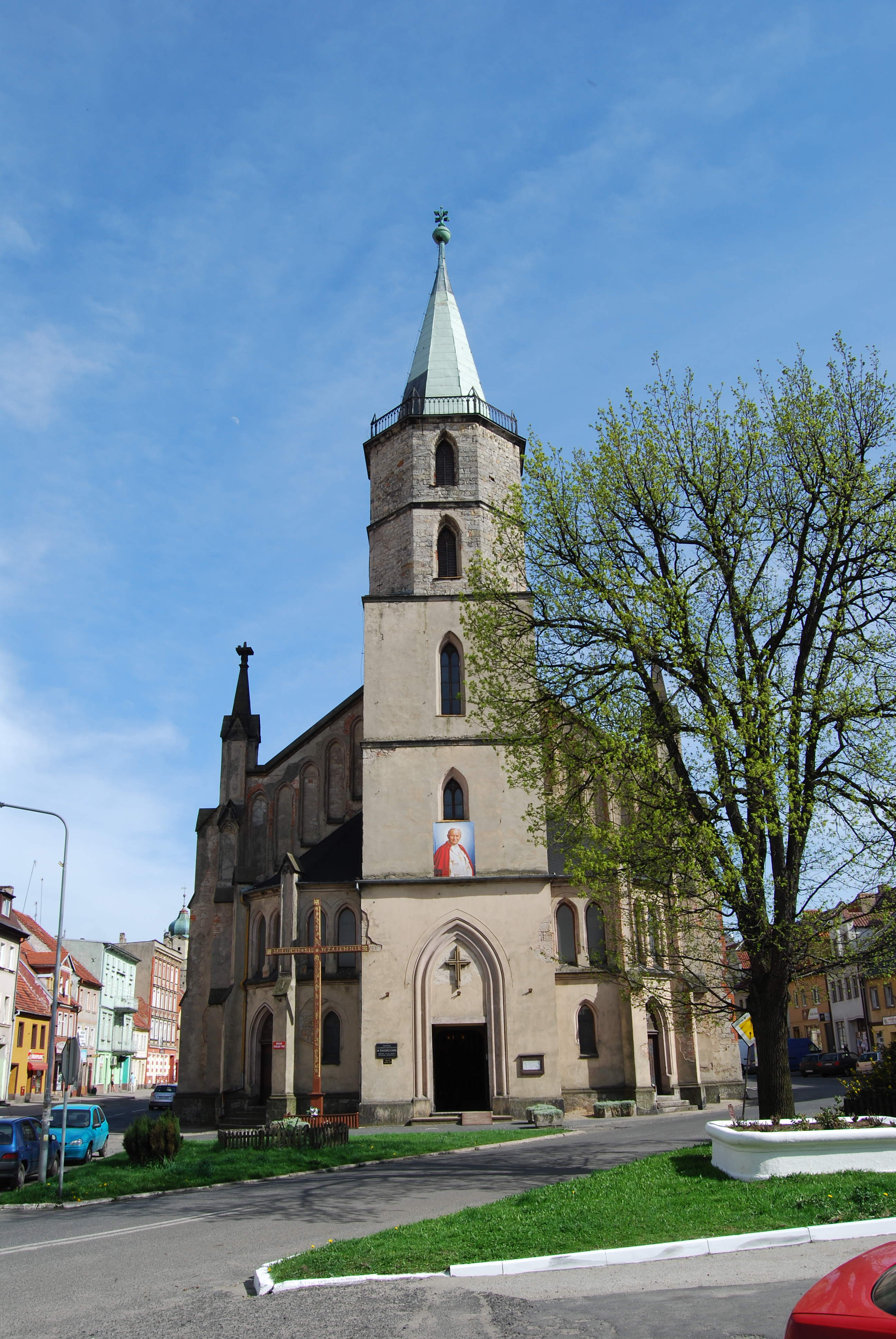 kościół ewangelicki, ob. rzym.-kat. p.w. św. Józefa Opiekuna Zbawiciela, 1748, 1844, Świerzawa, pl. Wolności